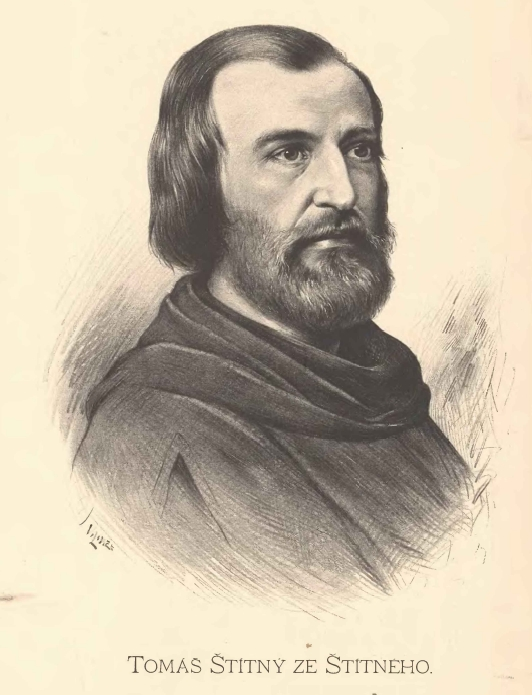 Portréty předních osobností od Jana Vilímka